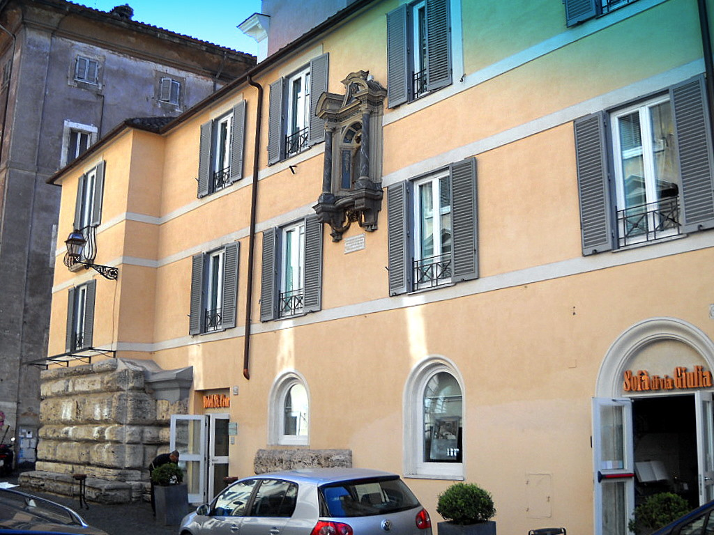 St. George Hotel five star in Rome, via Giulia